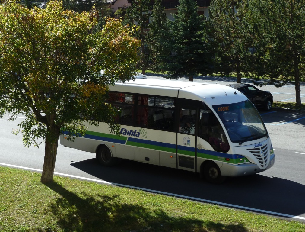 Shuttle bus, tratta Lillaz-Cogne - Autore: Rcap; Opera propria